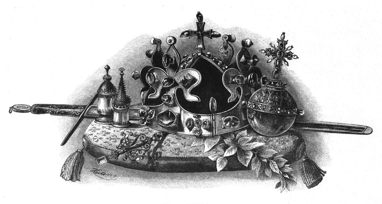 Kresba českých korunovačních klenotů